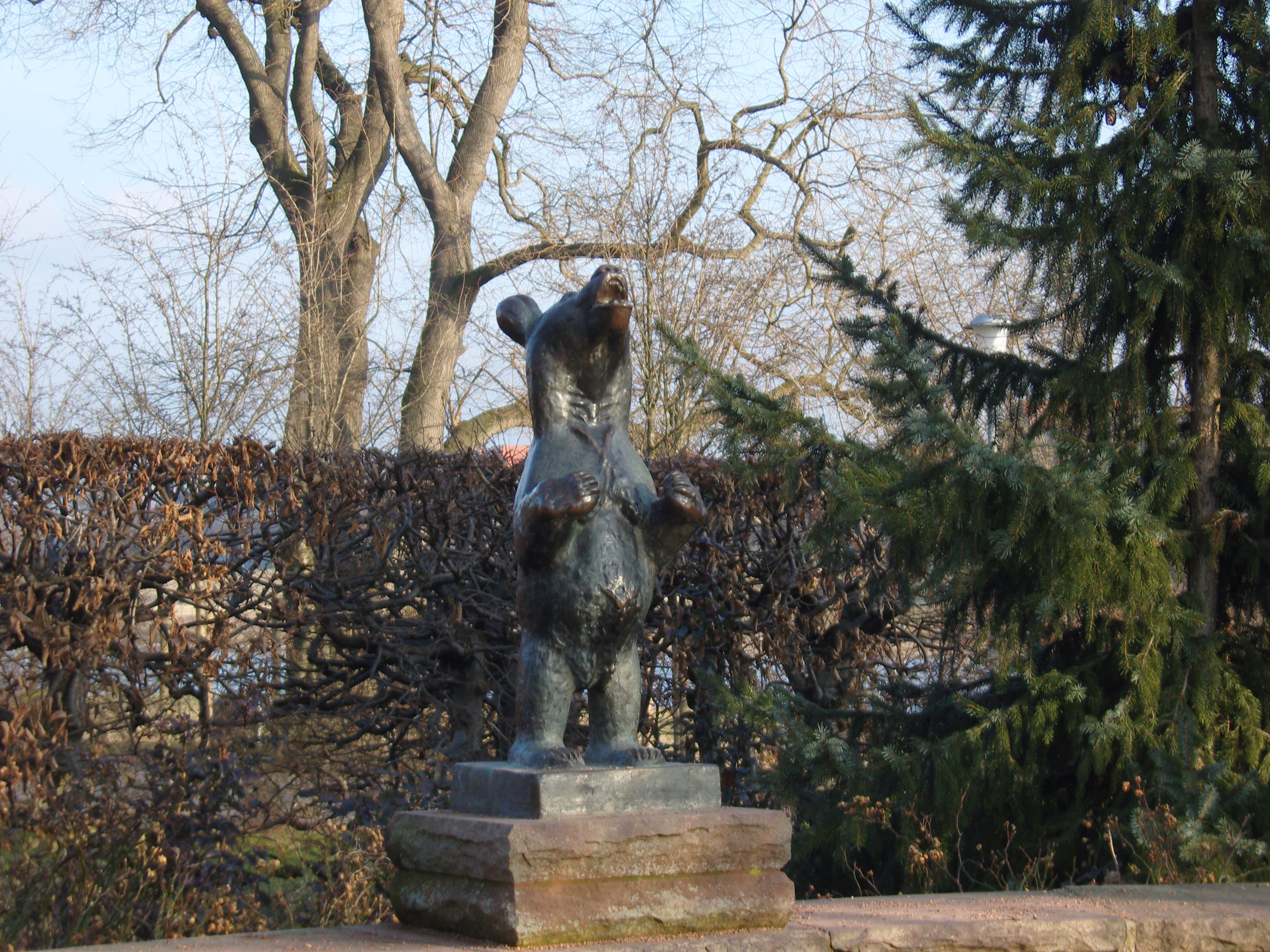 Bronzeplastik Bär von Rudolf Löhner im Rosengarten in Dresden